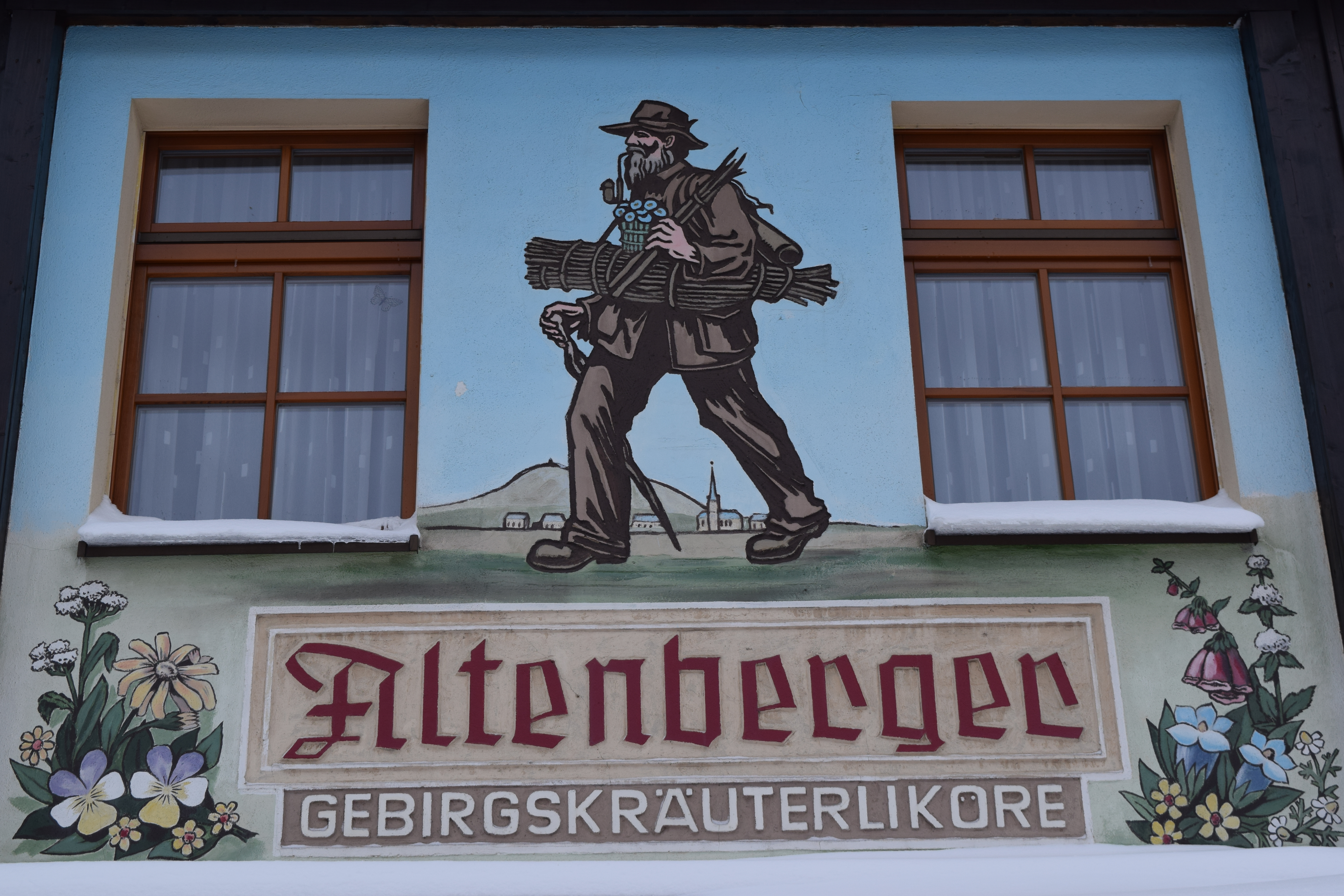 Altenberger - Fassade